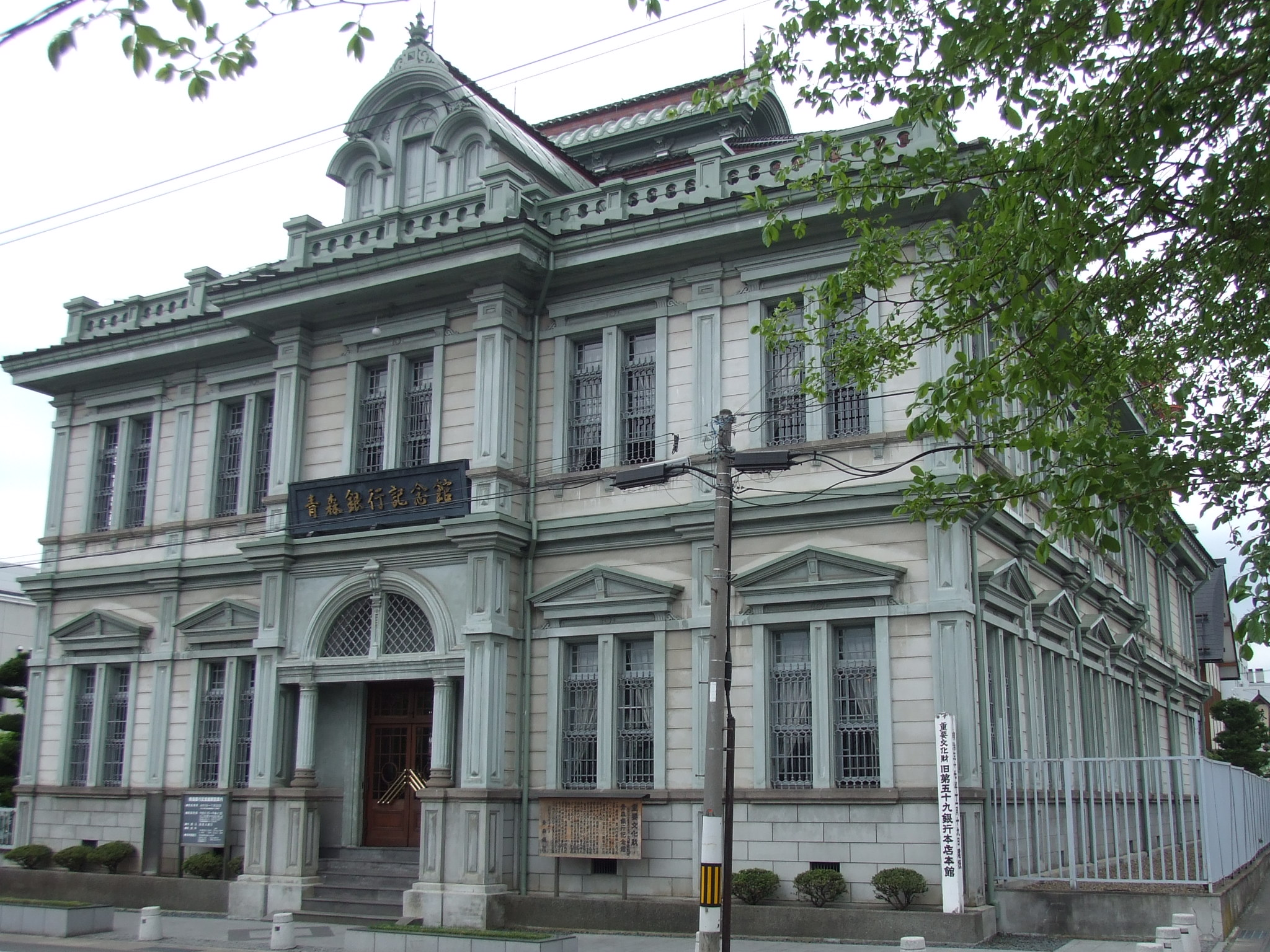 旧第五十九銀行本店本館